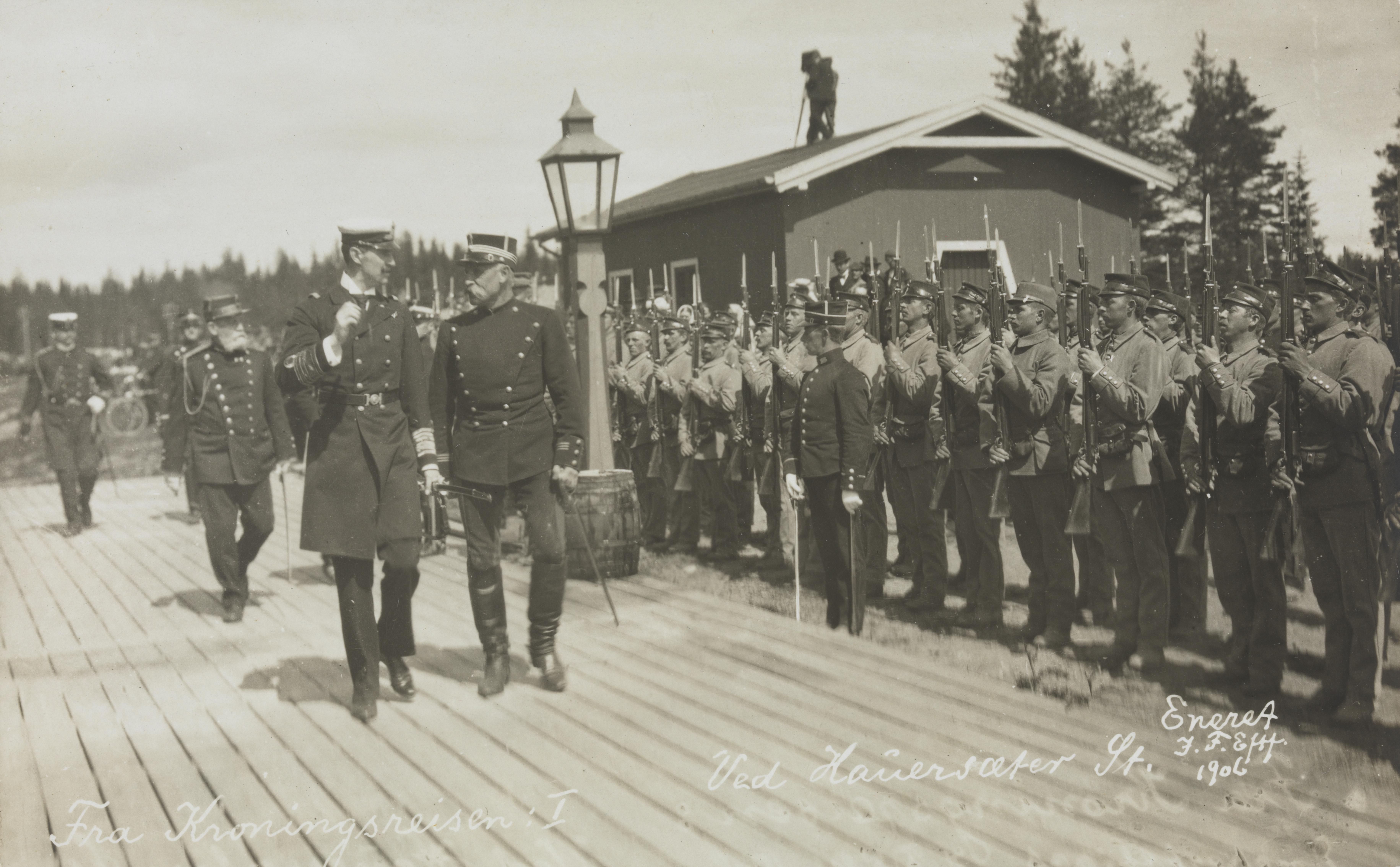 Bildet er hentet fra Nasjonalbibliotekets bildesamling Hauerseter stasjon, Ullensaker, Akershus Depicted person: Haakon VII konge av Norge